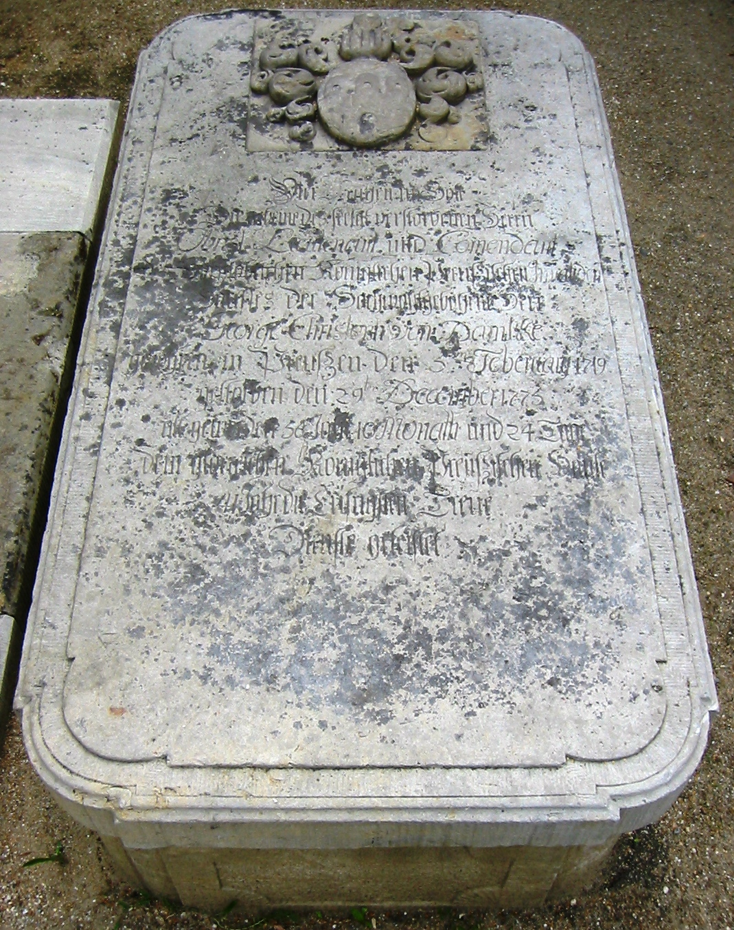 Grabstein von Georg Chrisoph von Daembke (1719-1775), dem zweiten Chef des Invalidenkorps und Kommandant des Invalidenhauses in Berlin